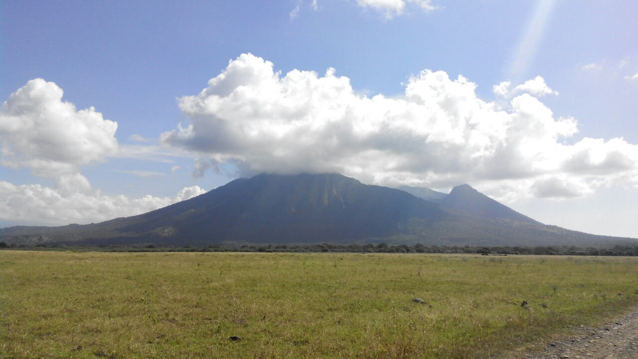 Terletak di dalam Taman Nasional Baluran, Jawa Timur